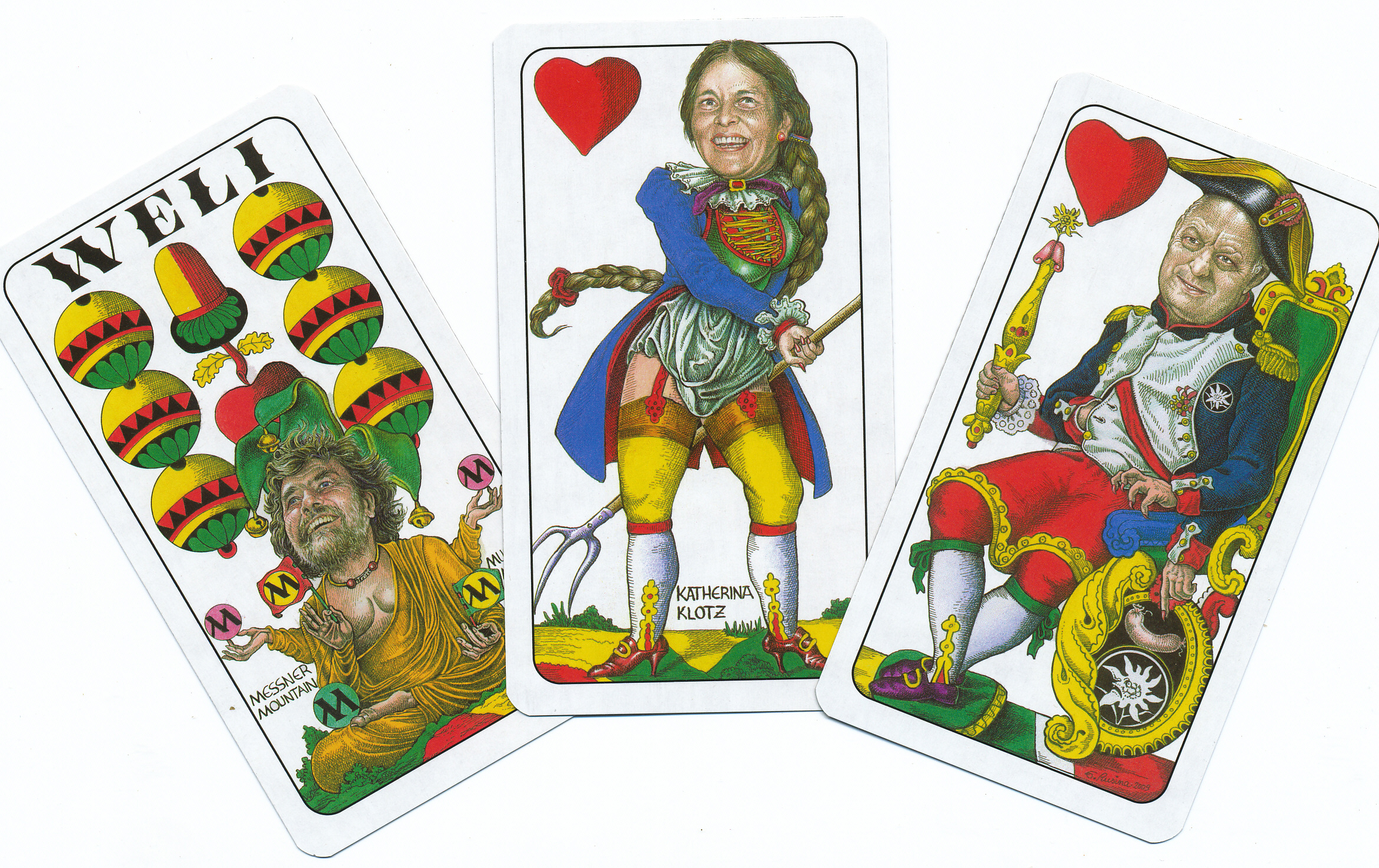 Wattkaerten des Südtiroler Malers Egon Moroder Rusina